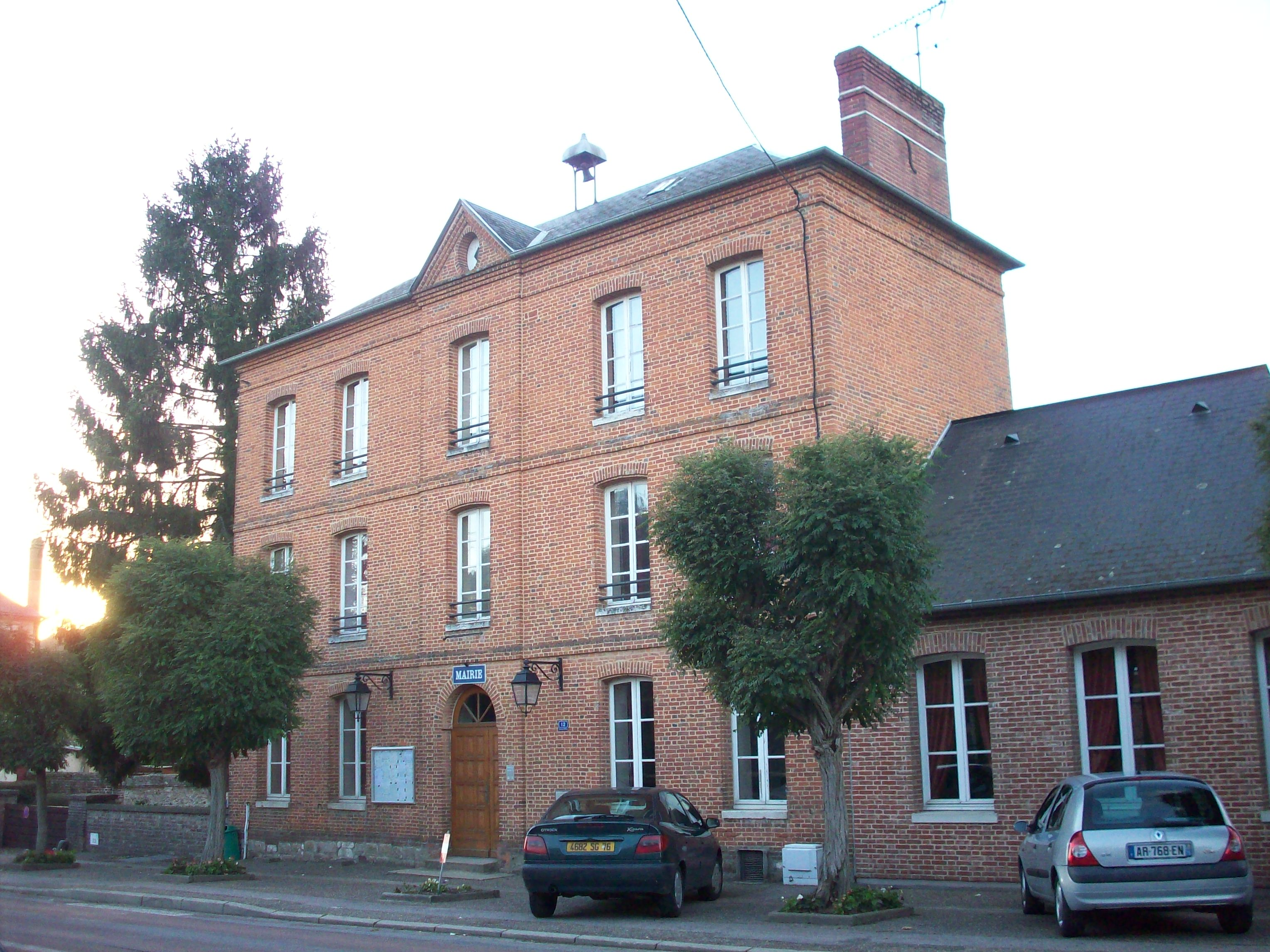 Vue de la mairie de Croisy-sur-Andelle.